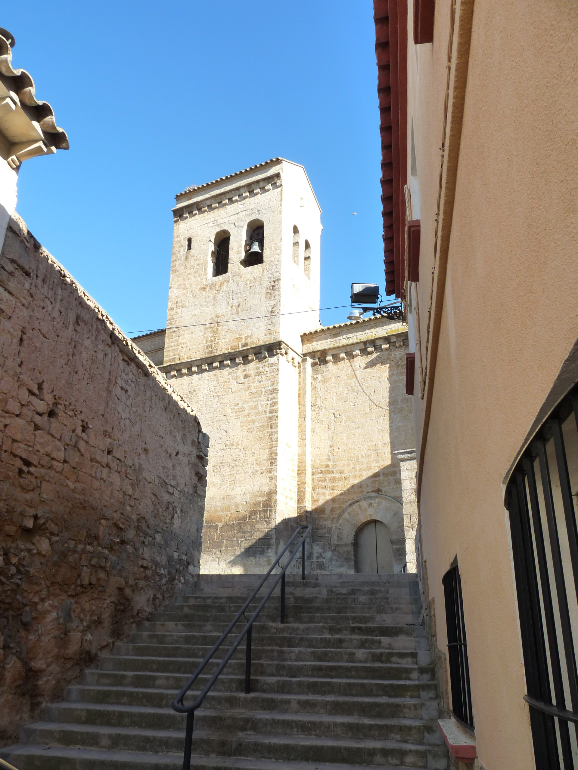 Ontiñena - Iglesia de Santa María la Mayor (s. XIII)